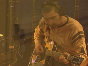 Daran en studio, juillet 2006 - (c) Samuel Rozenbaum.